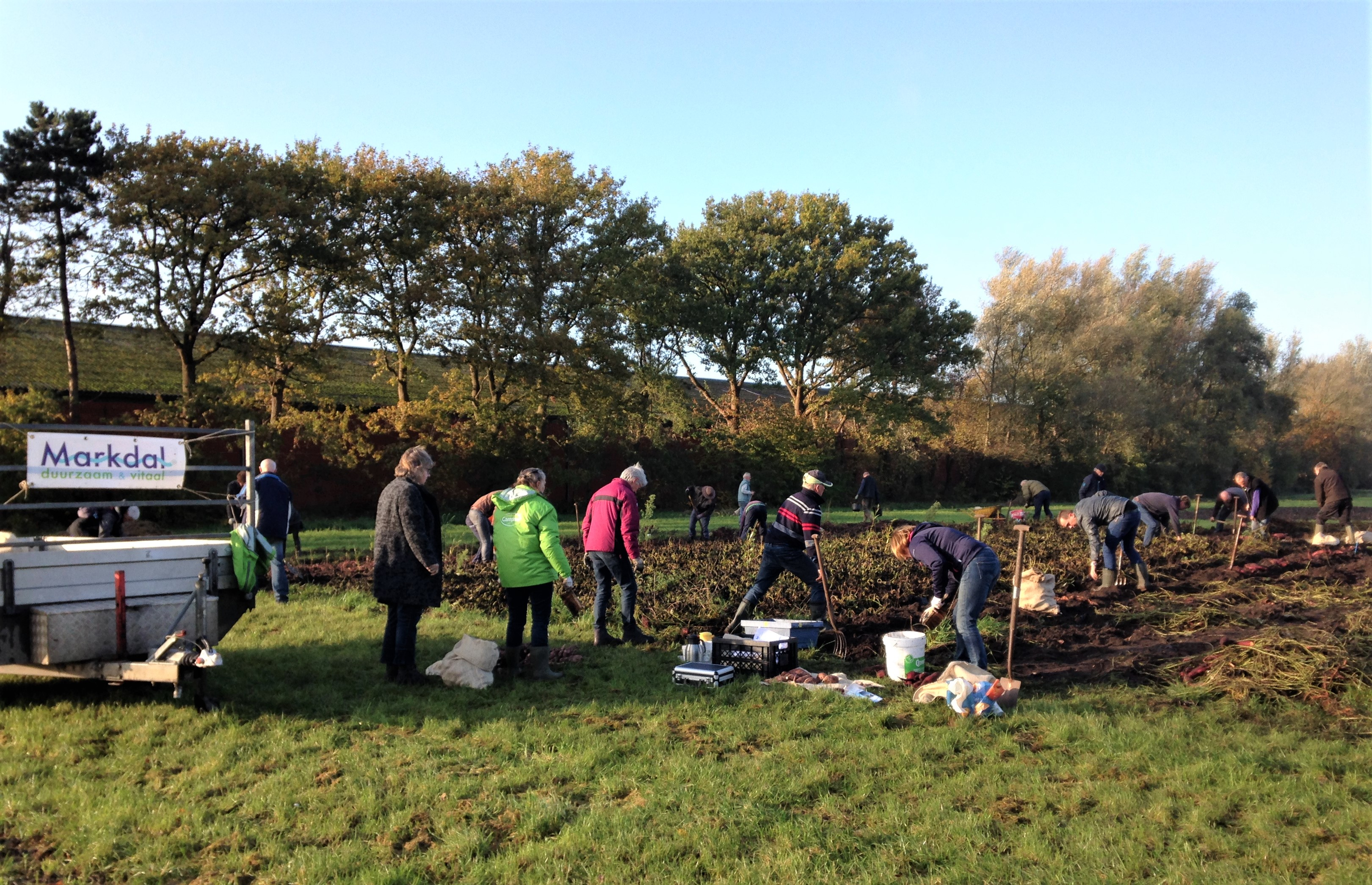 Zoete aardappelen van proefvelden geoogst voor o.a. Voedselbank.